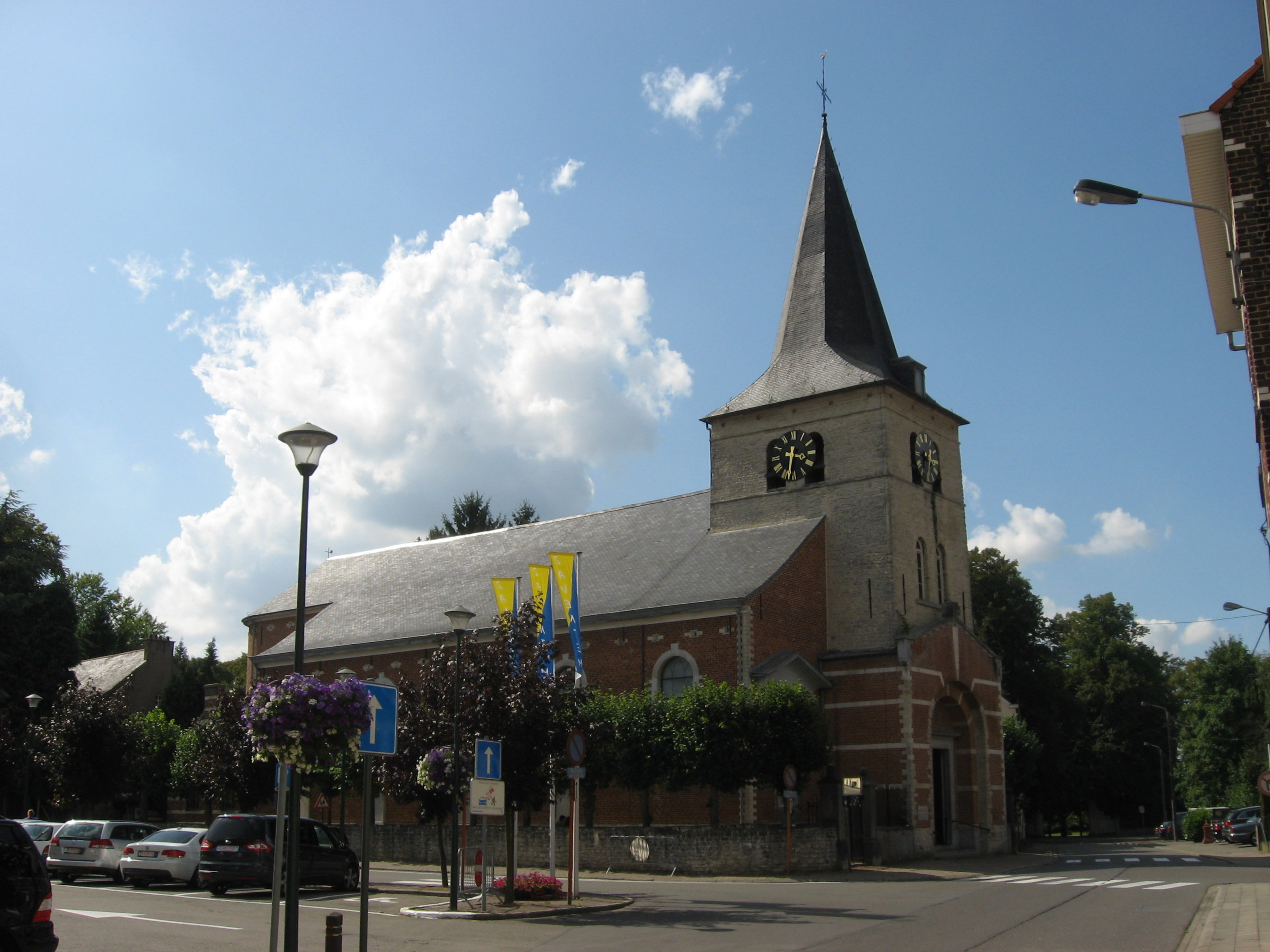 De parochiekerk Sint-Pancratius te Sterrebeek